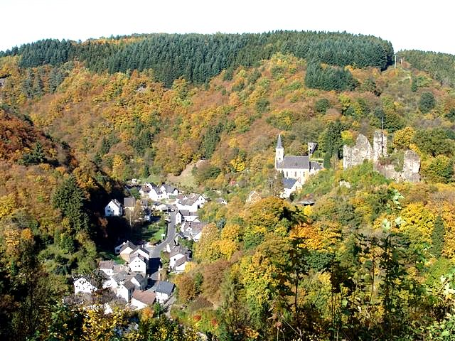 Ruine der Isenburg (Westerwald) mit Blick auf den Ort